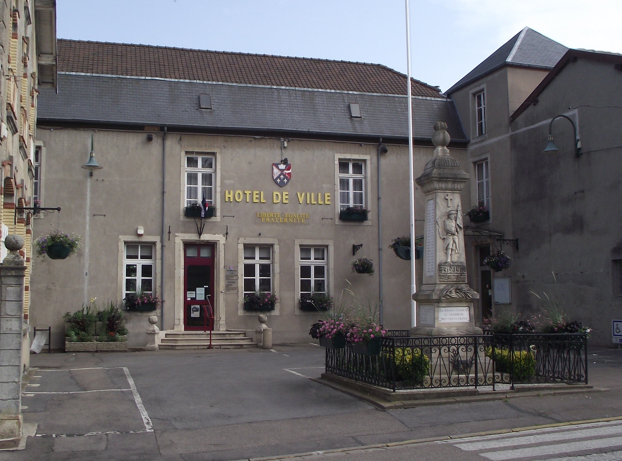 L'Hôtel de Ville et le monument aux Morts à Ecrouves.